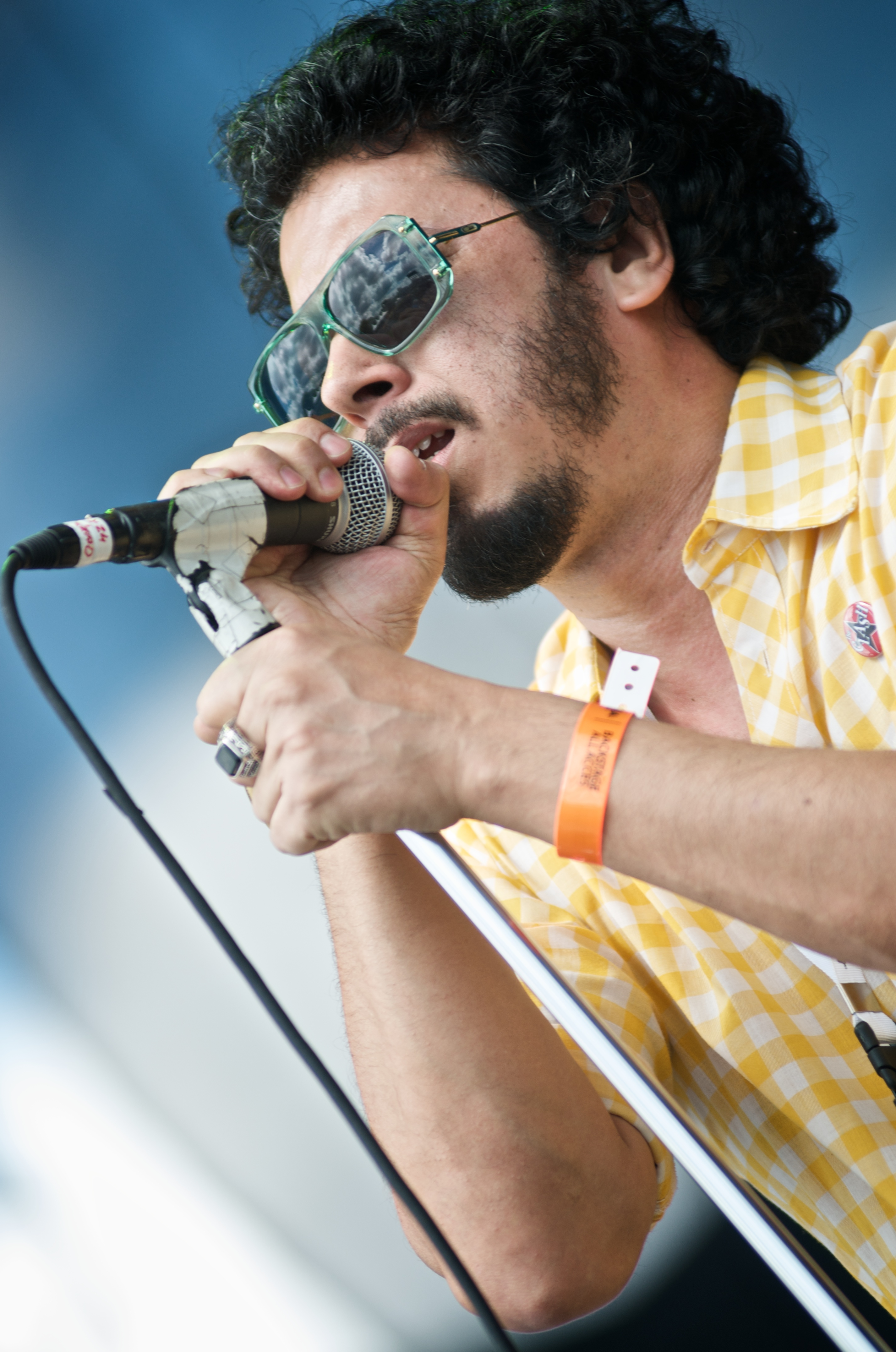 Primeiro dia de shows do Festival Maquinária a banda Nação Zumbi abriu o palco principal.